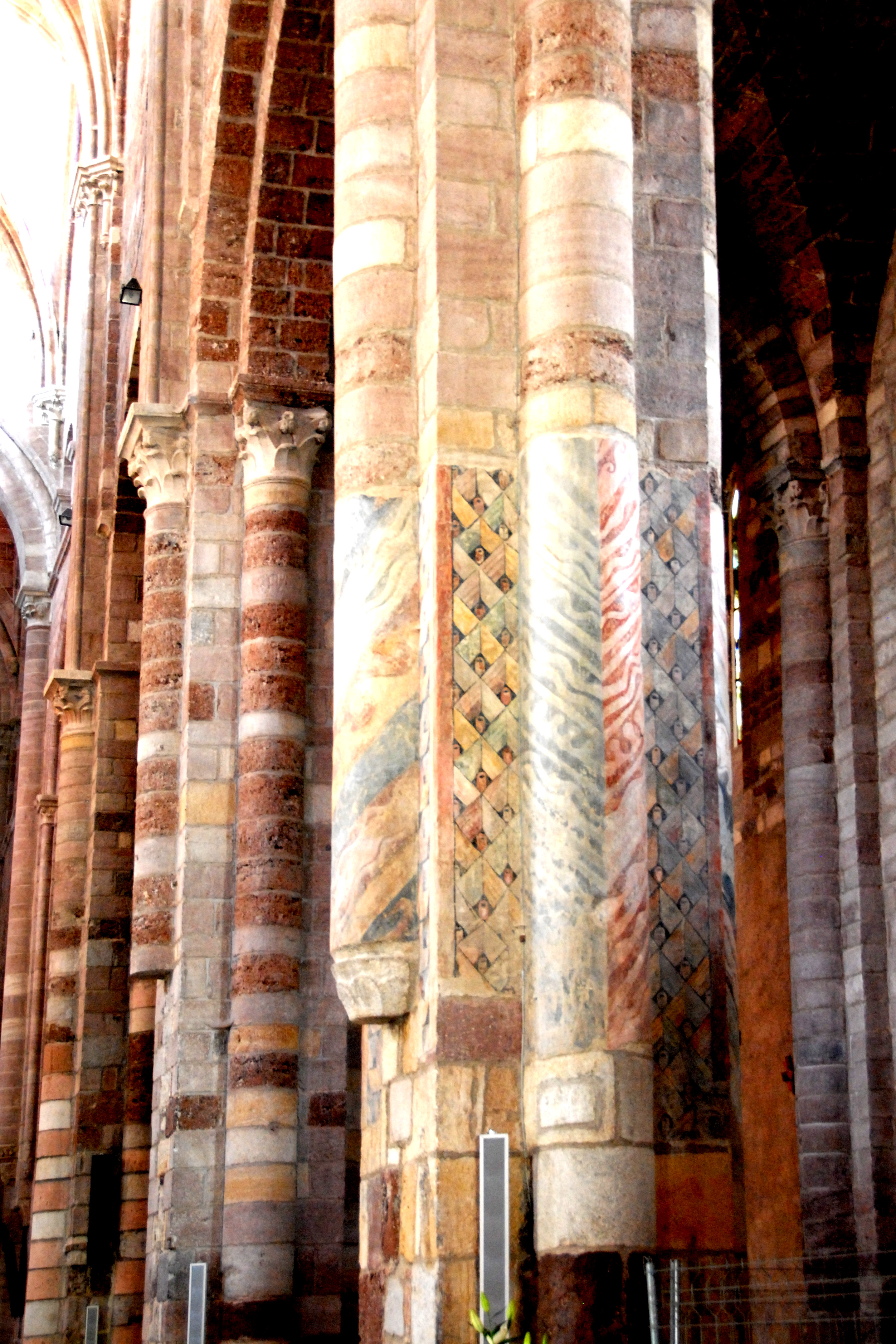 St.-Julien Brioude, Fresken, südöstl. Mittelschiffpfeiler